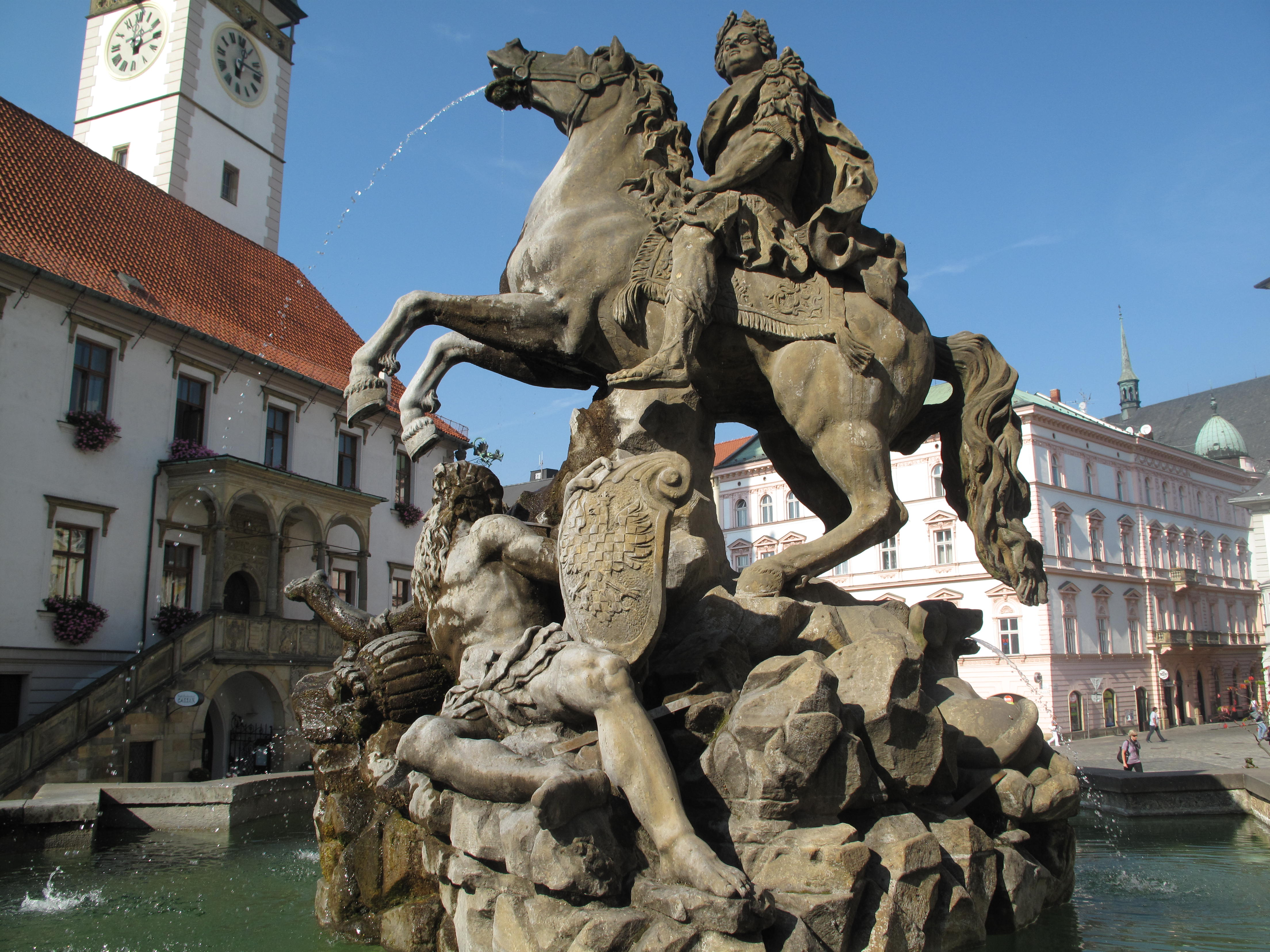 Olomouc